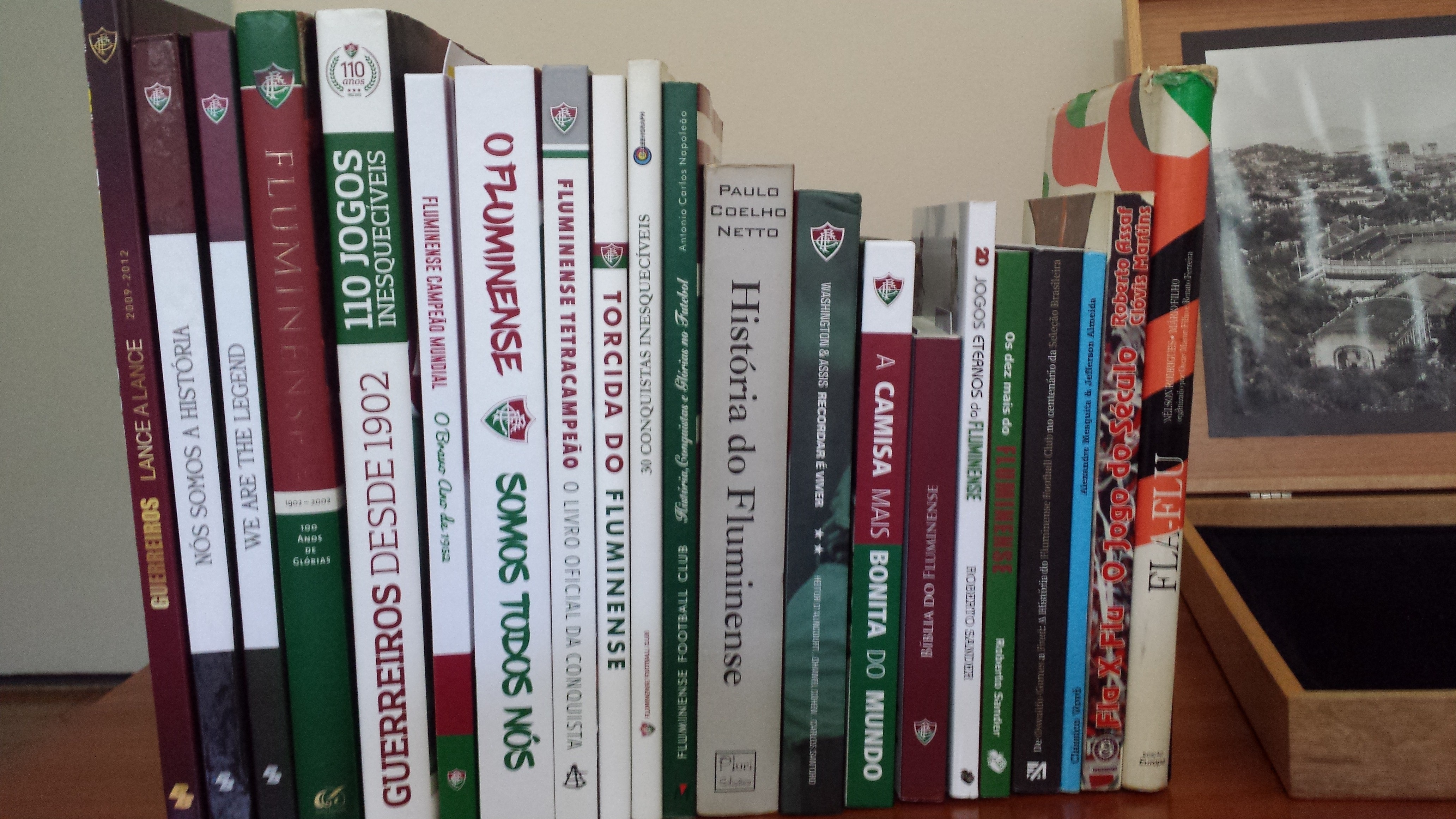 Livros sobre o Fluminense Football Club.